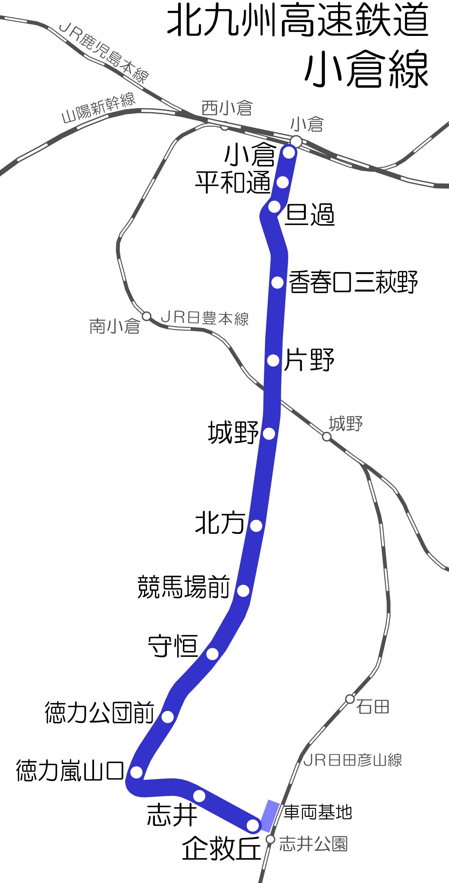 北九州高速鉄道の路線図。投稿者（氷鷺）が作成。